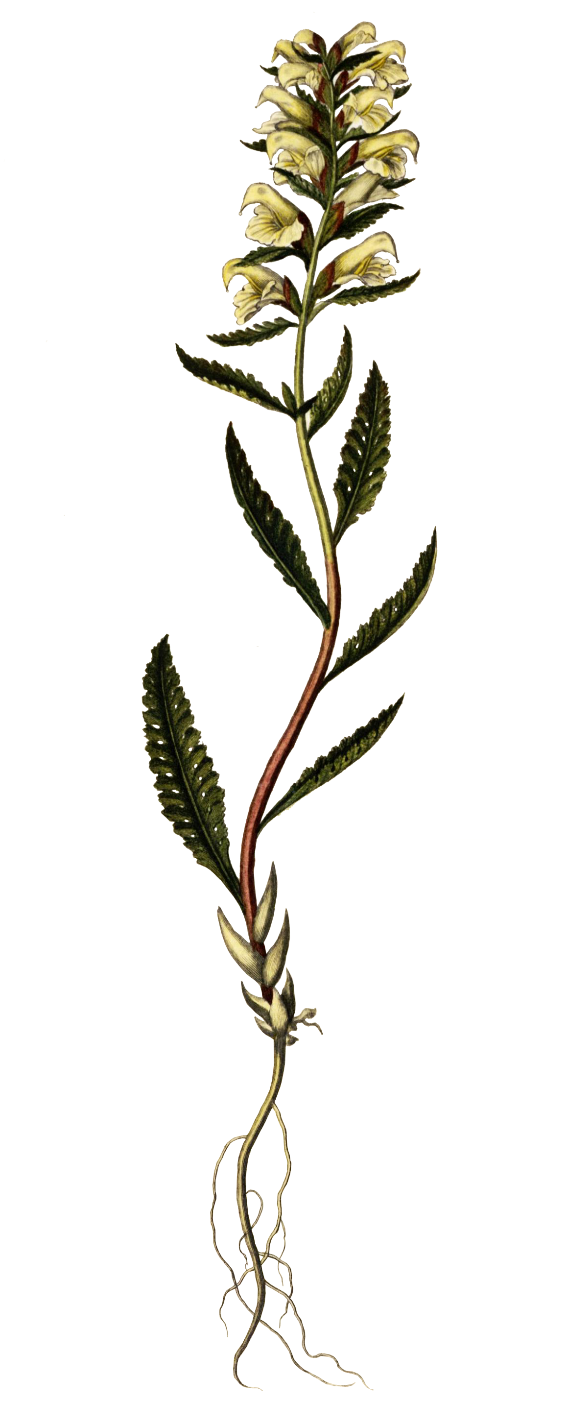 Pedicularis lapponica L.